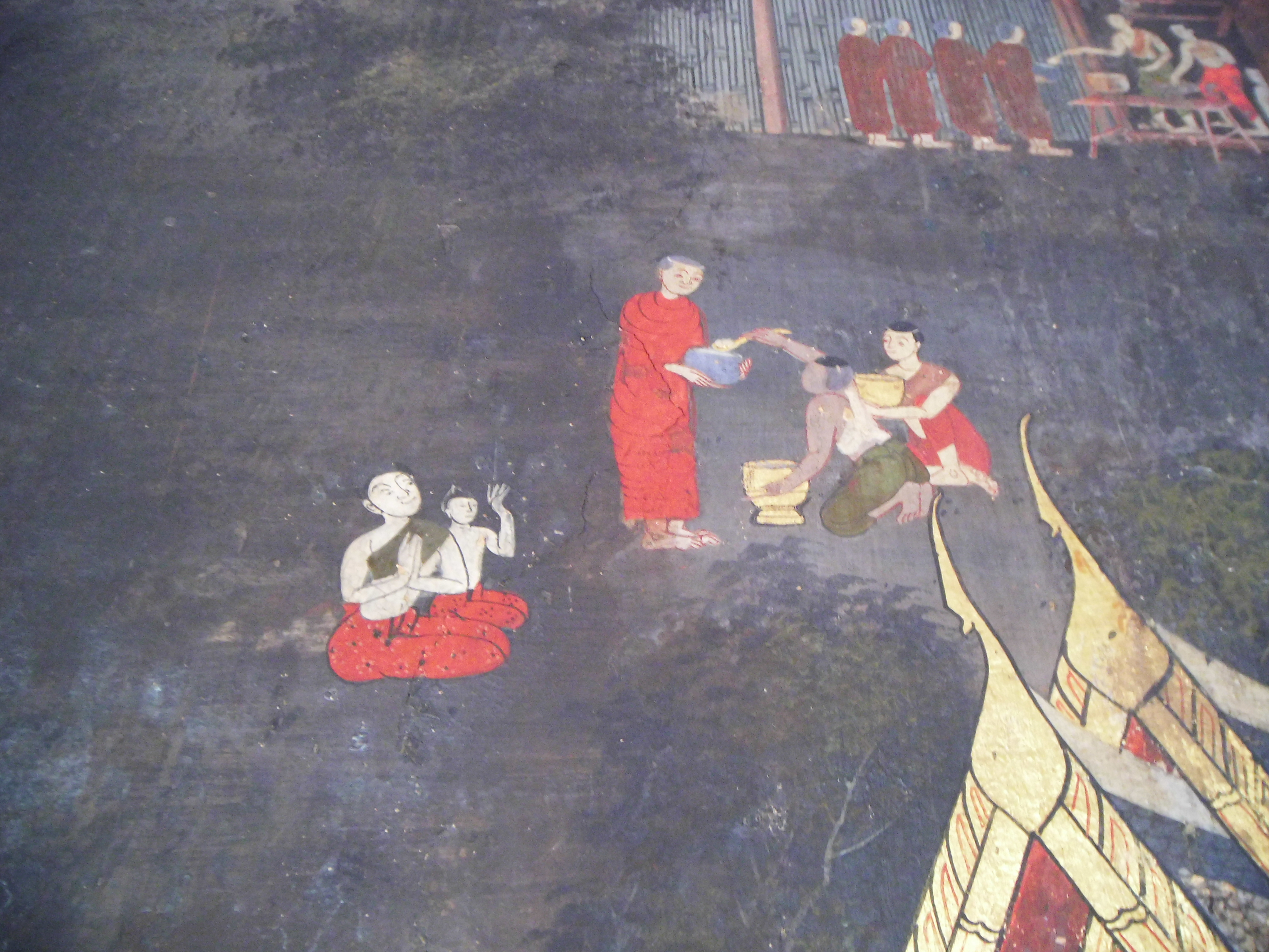 วัดมหาพฤฒาราม